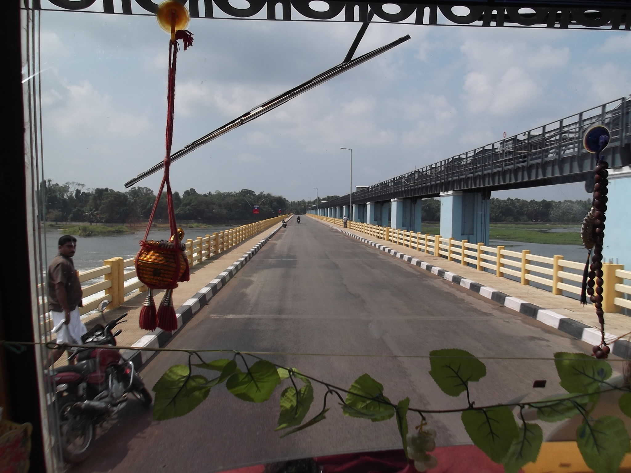 ഭാരതപ്പുഴയുടെ കുറുകെയുള്ള പാലത്തിന്‍റെ മുകളില്‍ വാഹനത്തിലിരുന്ന്‍ ഒരു കാഴ്ച.